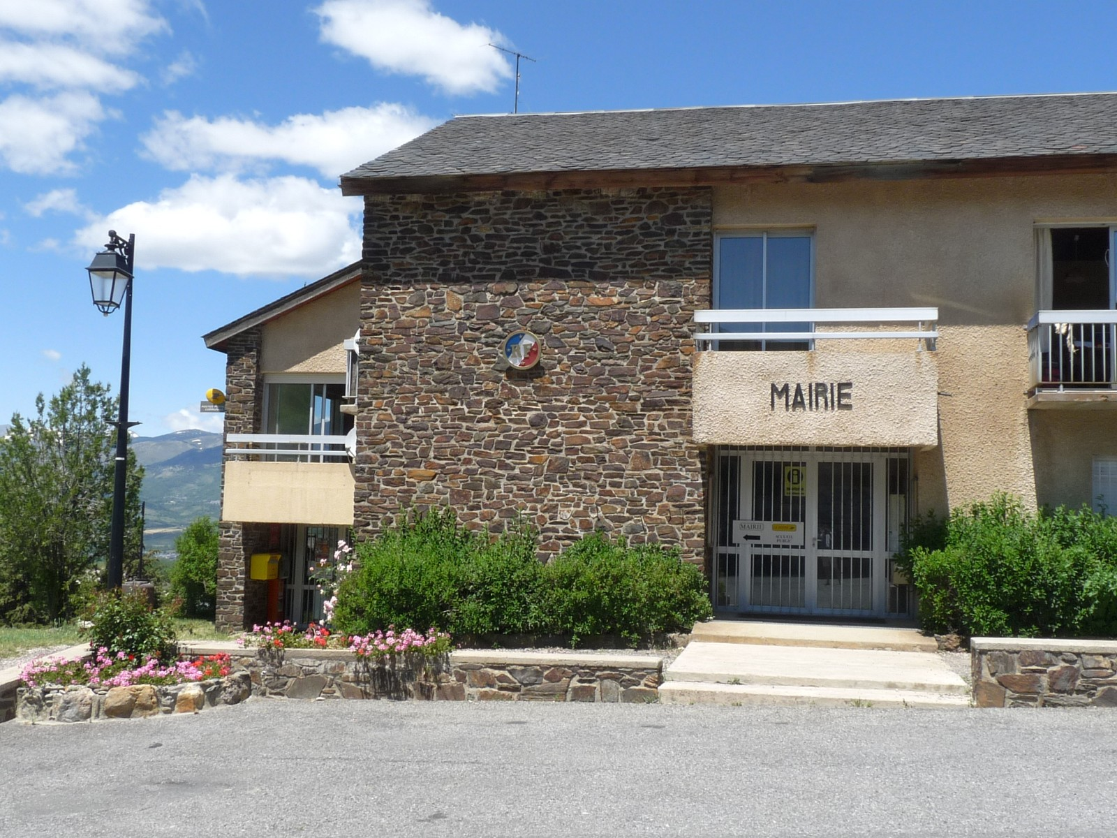 Mairie d'Err, Pyrénées-Orientales, France